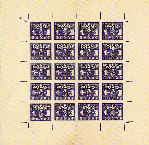 Von der OSS gefälschte Parteibriefmarken der NSDAP